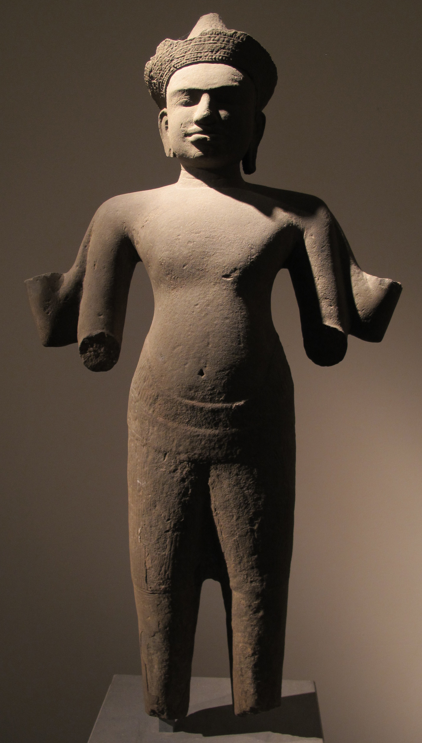 Cambogia, vishnu, prov. ignota, stile di transizione tra baphuon e angkor vat, 1150-1210 ca.